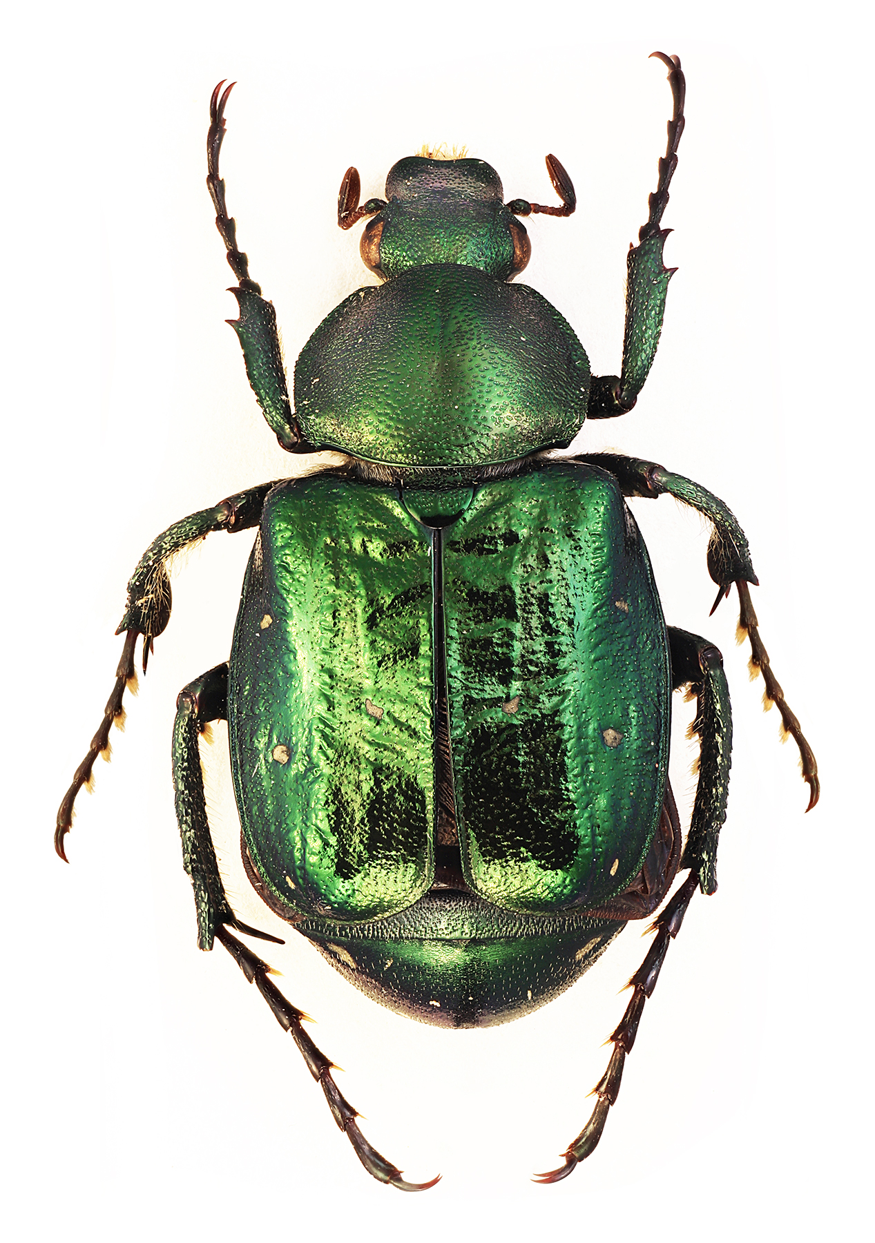 Gnorimus nobilis, male